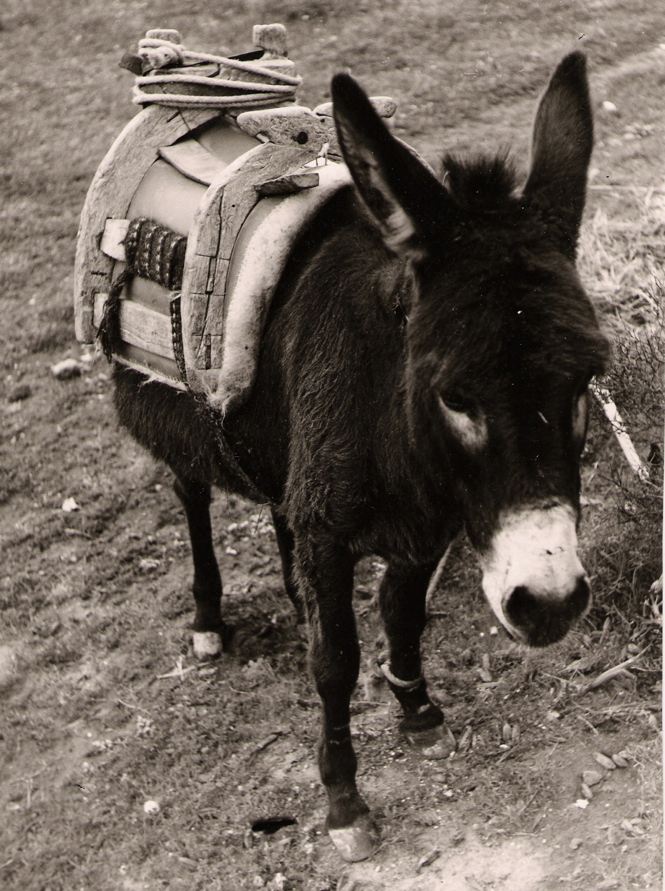 Griechischer Esel auf Rhodos